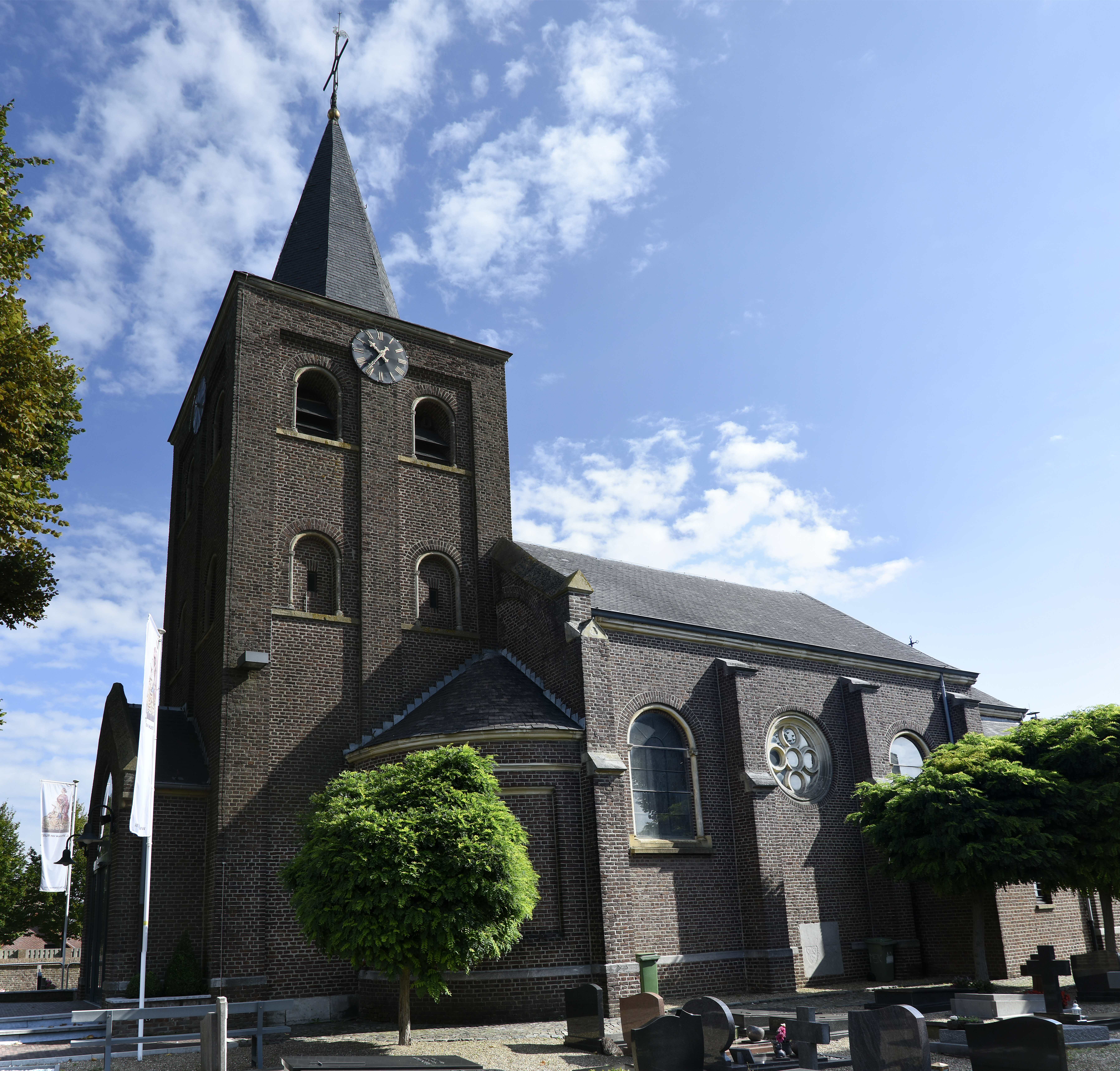 De Sint-Gertrudiskerk te Heppeneert, België